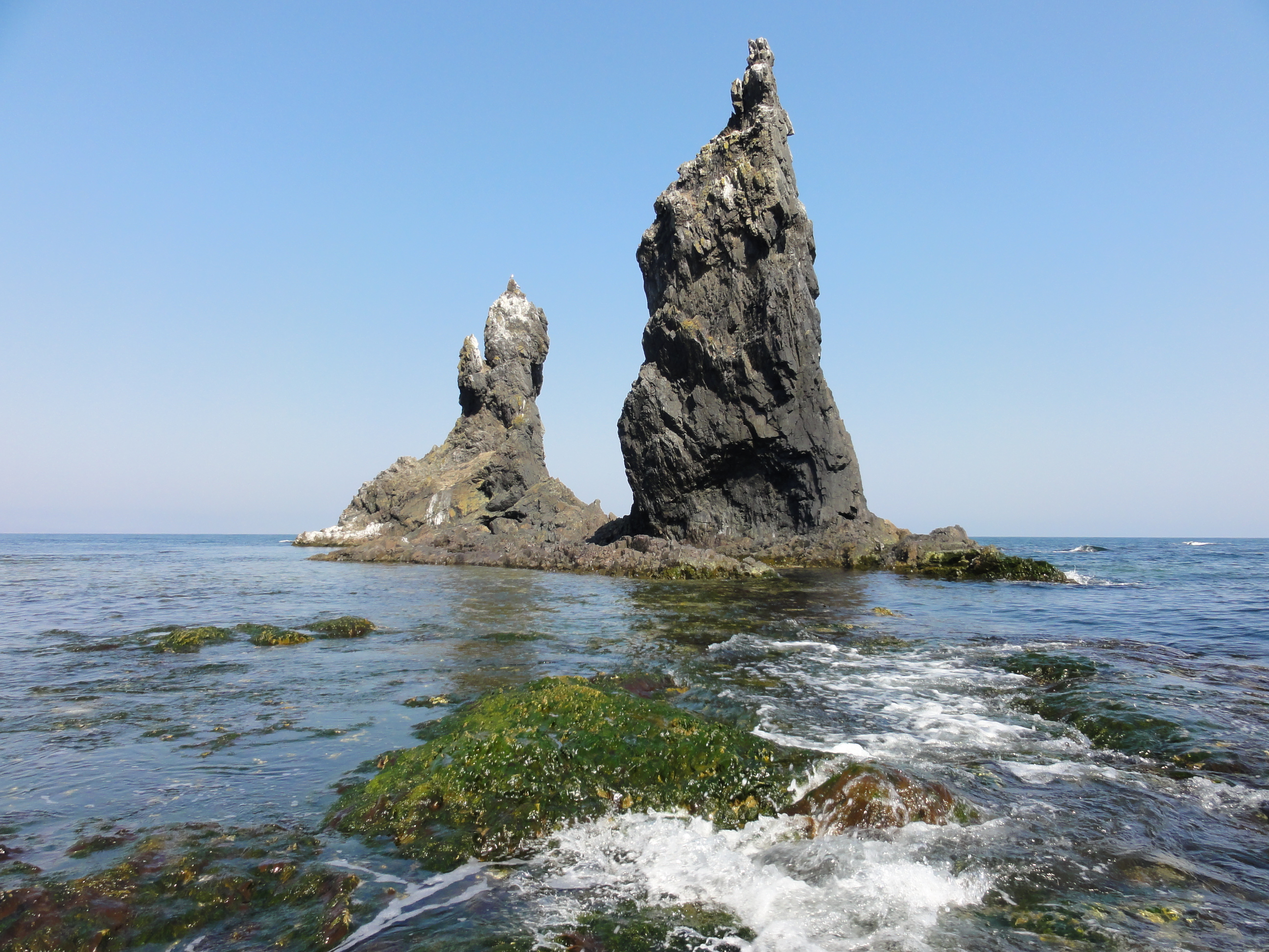 Отдельно стоящие скалы